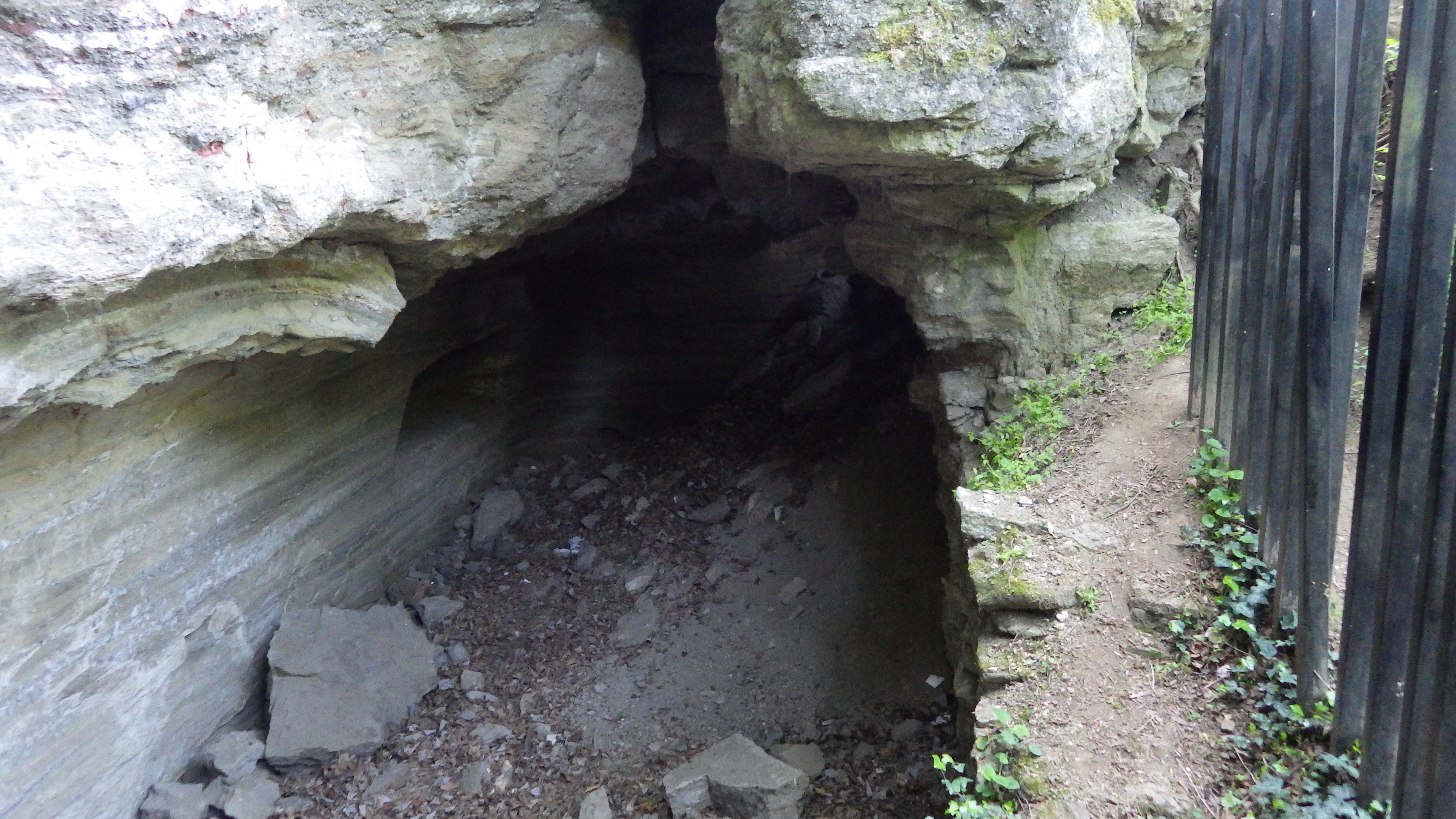 Einsiedlerhöhlen auf Tihany